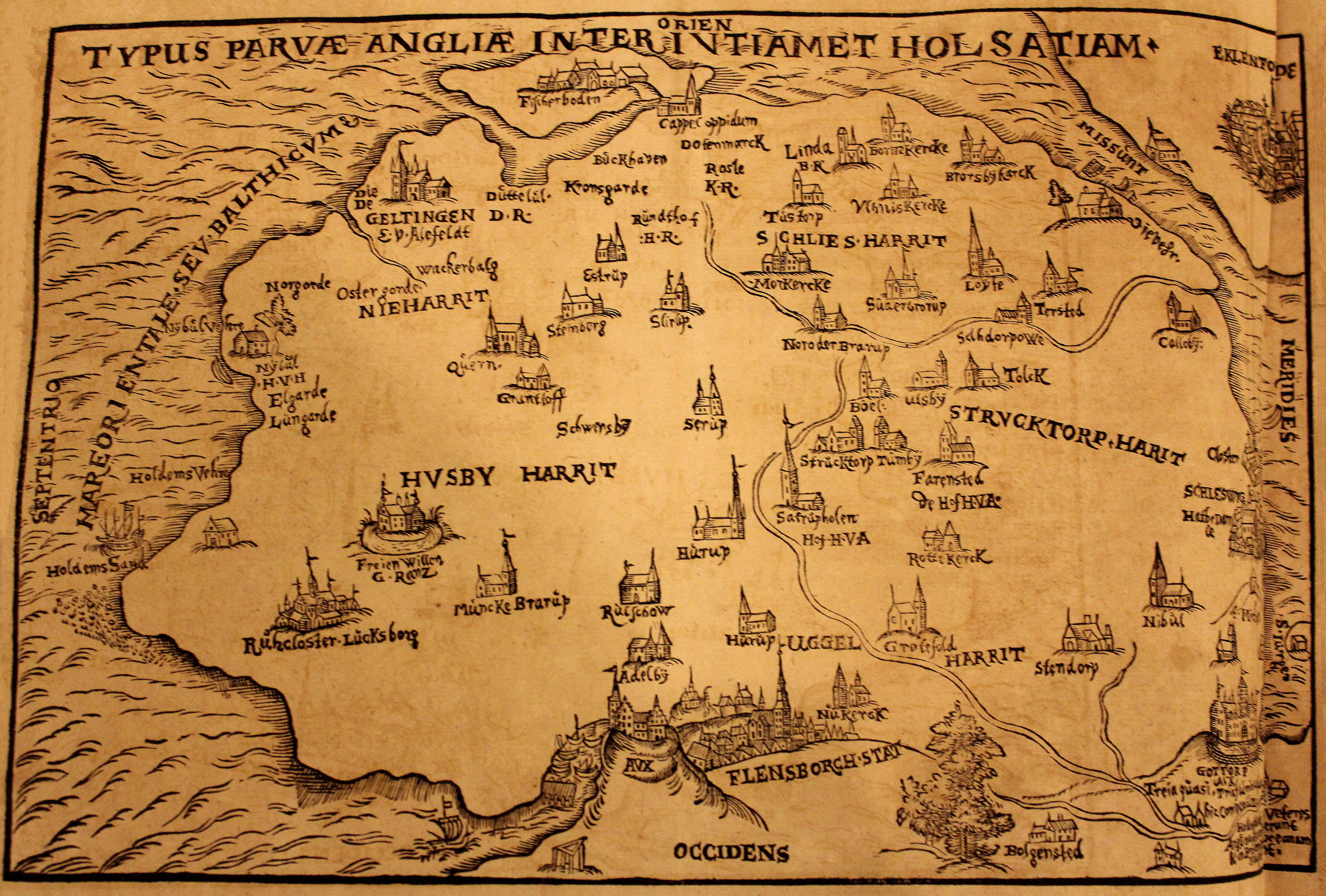 Foto von der Karte von Angeln von 1596, mit Flensburg, Kappeln, Schleswig etc, Bild 01